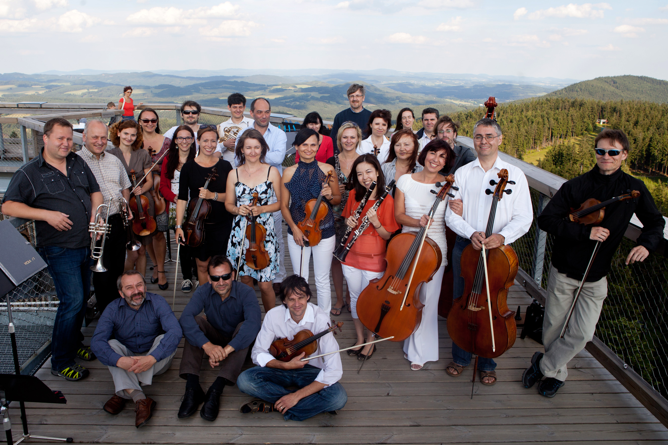 Jihočeská filharmonie